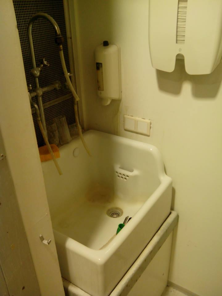 Een foto van de Einstein wasbak